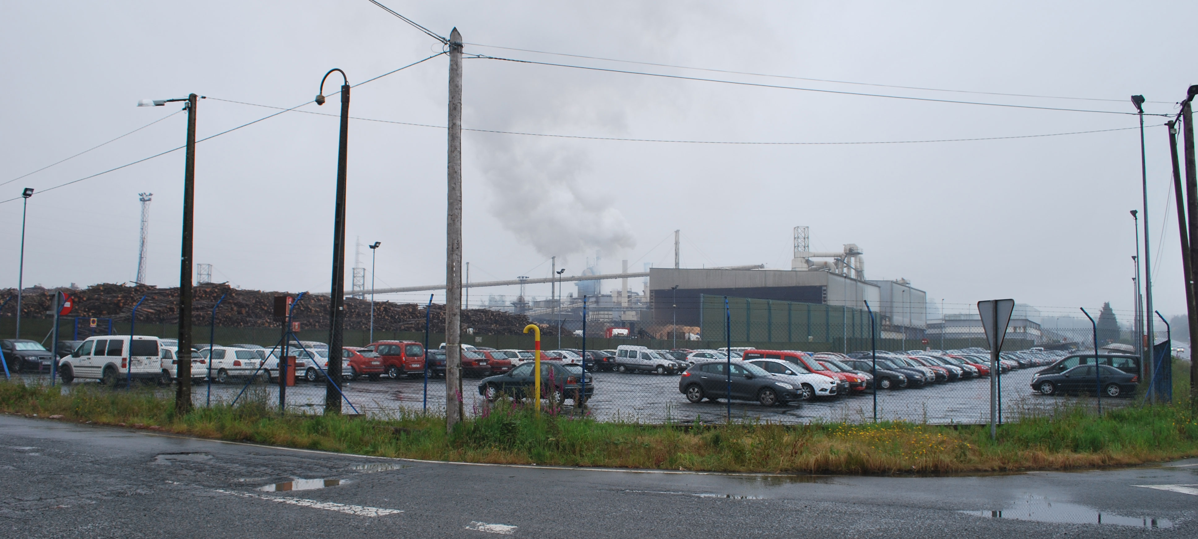 Vista Finsa Santiago de Compostela